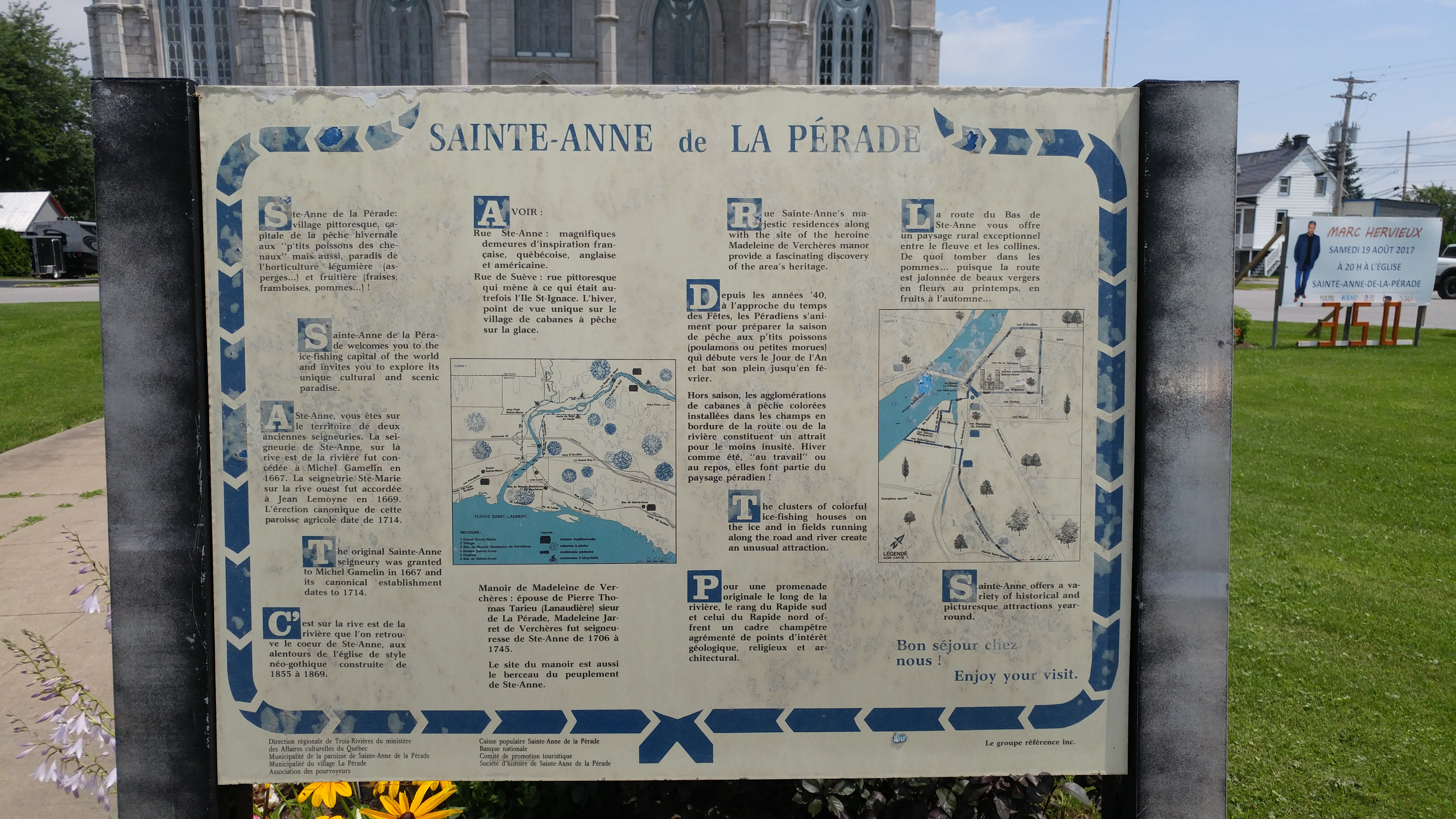 Panneau d'interprétation portant sur le tourisme à Sainte-Anne-de-la-Pérade, réalisé par Danielle Larose pour Le Groupe Référence inc., et placé devant l'église.